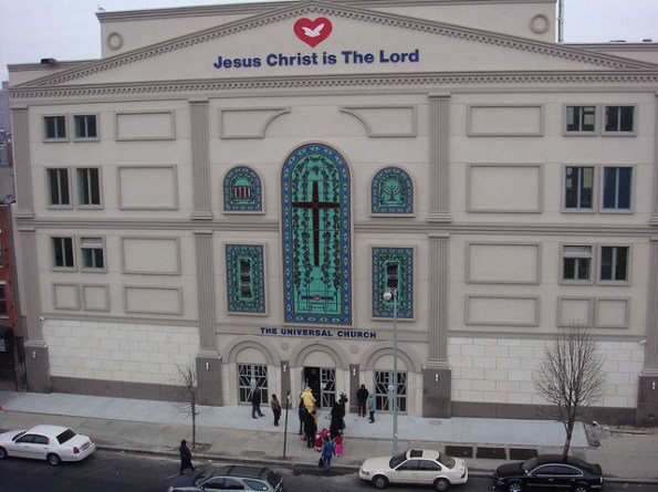 eglise universelle new york